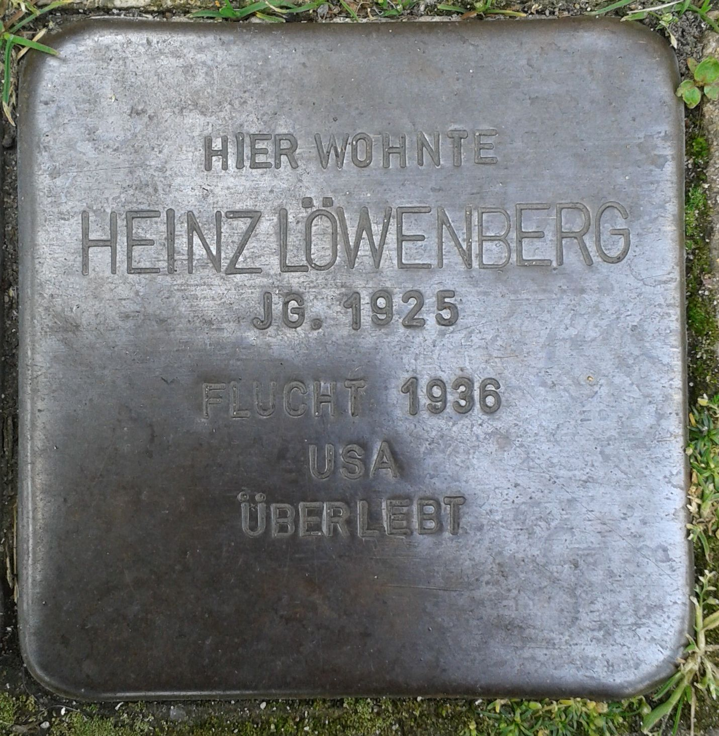 Stolperstein Datteln Münsterstraße 13 Heinz Löwenberg